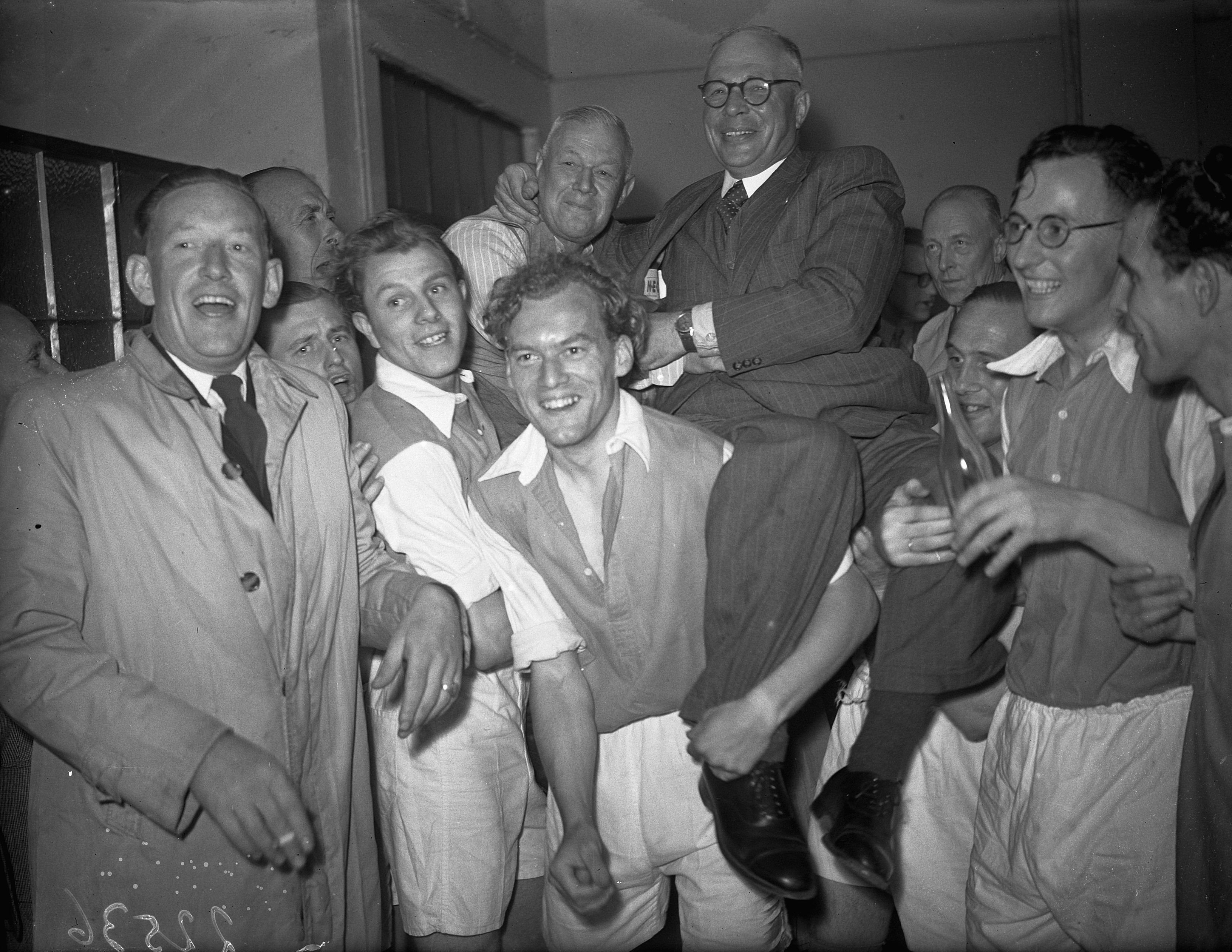 Collectie / Archief : Fotocollectie Anefo Reportage / Serie : [ onbekend ] Beschrijving : Ajax kampioen van Nederland Datum : 5 juli 1947 Locatie : Nederland Trefwoorden : kampioen Instellingsnaam : AJAX Fotograaf : Noske, J.D. / Anefo Auteursrechthebbende : Nationaal Archief Materiaalsoort : Glasnegatief Nummer archiefinventaris : bekijk toegang 2.24.01.09 Bestanddeelnummer : 902-2536